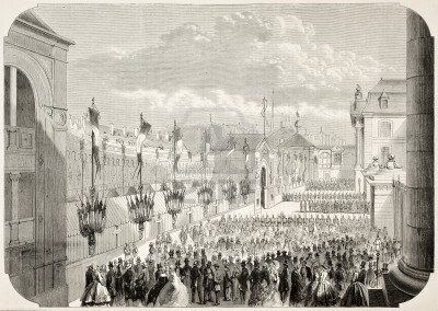 publié sur L'Illustration, Journal Universel, Paris